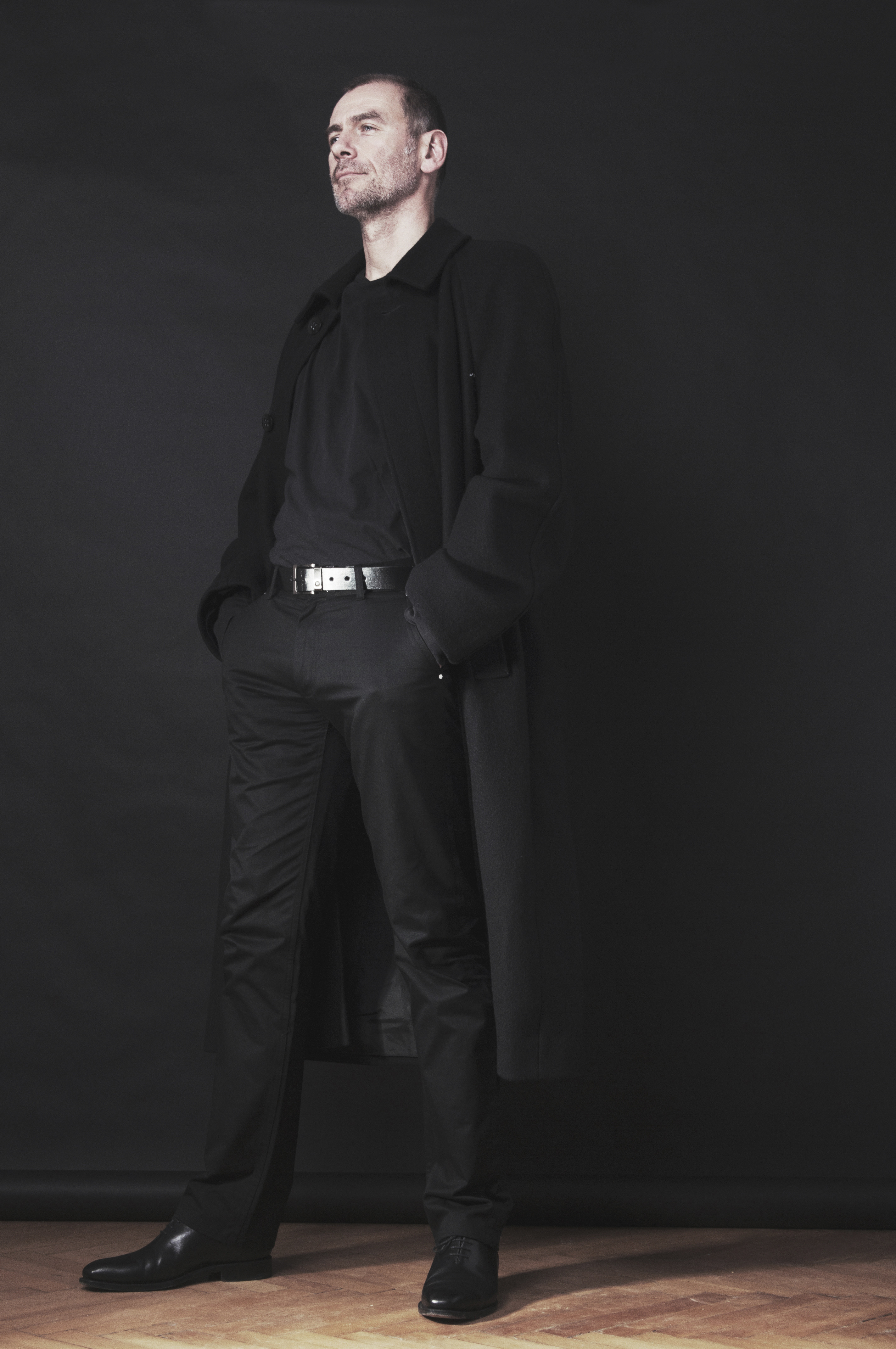 Tóth Sándor színművész stúdiófotó 2014 októberéből